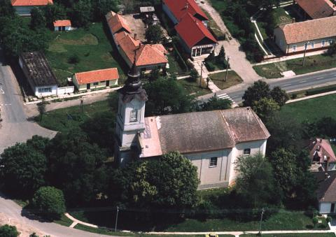 Tiszaörs, Hungary, aerialphotography. Szűz Mária látogatása római katolikus templom